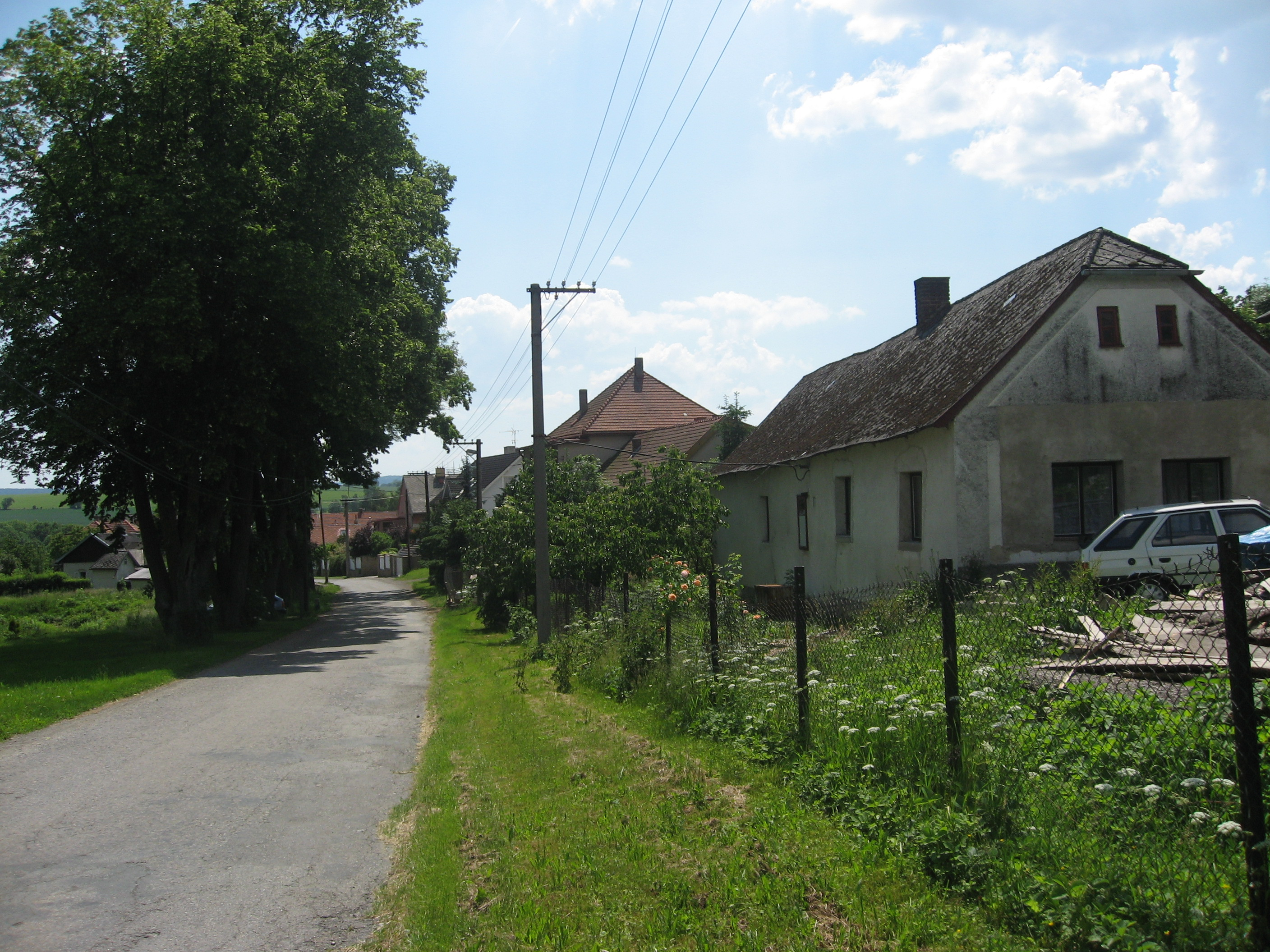 Květinov